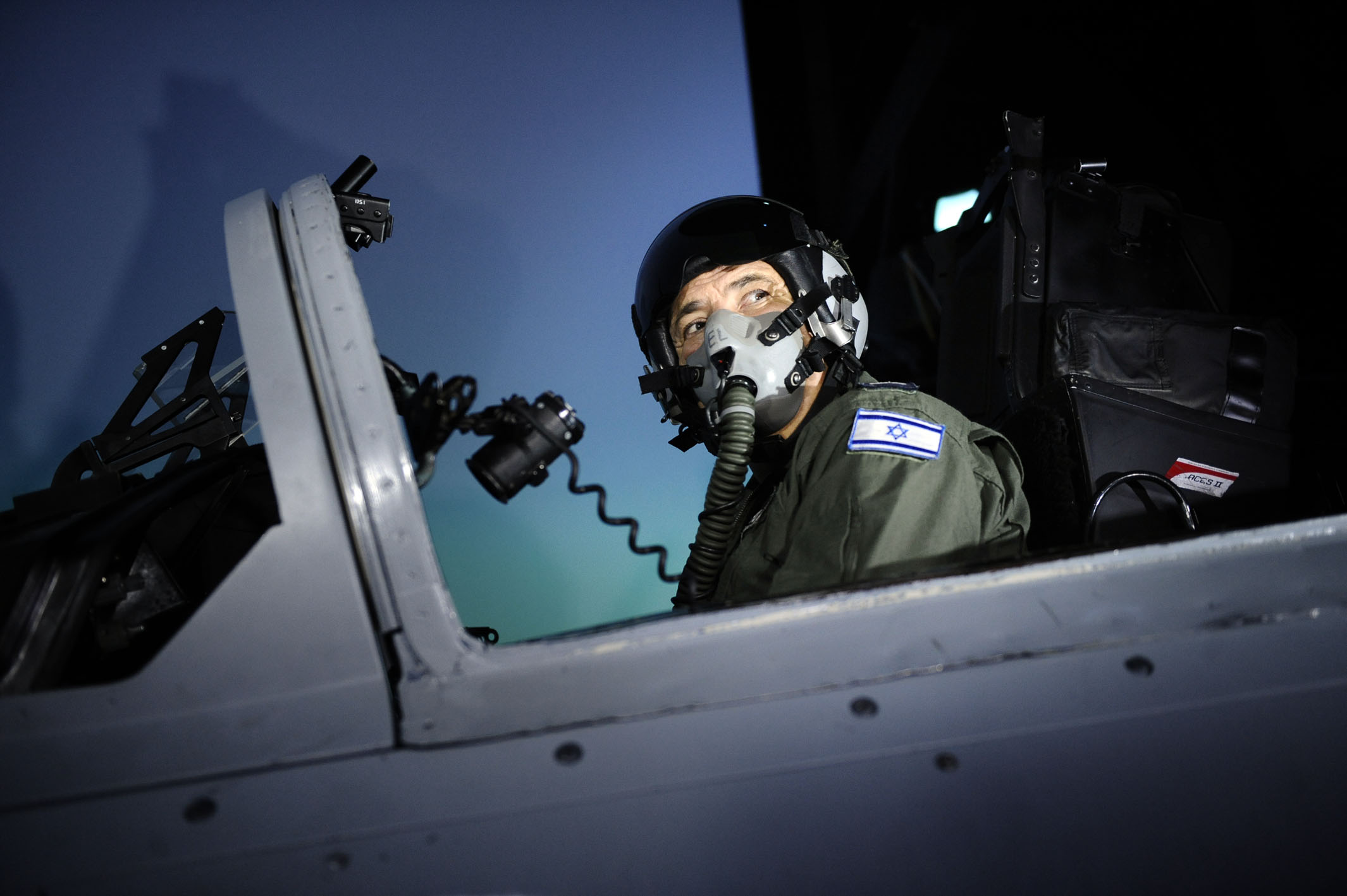 November 15, 2010. During an exercise for the new Israeli Air Force combat training squadron, the Commander of the Air Force Maj. Gen. Ido Nachushtan said this morning that the IAF is expected to expand its training exercises and increase the number of its flight hours in 2011 due to various security challenges. The Commander addressed the F-16I (Sufa) crash that occurred last week: "After weighing and examining what is known to us about the accident, the Sufa aircraft will return to flying. I embrace the Itkis and Levy families, two excellent soldiers of the IAF and IDF, among the best we had." Photography: Sgt. Ori Shifrin, IDF Spokesperson's Unit במהלך אימון בטייסת מאמני הקרב החדשה של חיל האוויר אמר הבוקר מפקד חיל האוויר, אלוף עידו נחושתן, כי חיל האוויר צפוי להרחיב את אימוניו ולהגדיל את כמות שעות הטיסה בשנת 2011, וזאת לאור האתגרים הביטחוניים בזירות השונות. עוד התייחס מפקד חיל האוויר לתאונת מטוס הסופה שאירעה בשבוע שעבר ואמר: "לאחר ששקלנו אמש ובחנו את הידוע לנו על התאונה חוזר היום מערך הסופה לטוס. אני מחבק את המשפחות איטקיס ולוי, שני לוחמים מובחרים של חיל האוויר וצה"ל, מהטובים שהיו לנו.